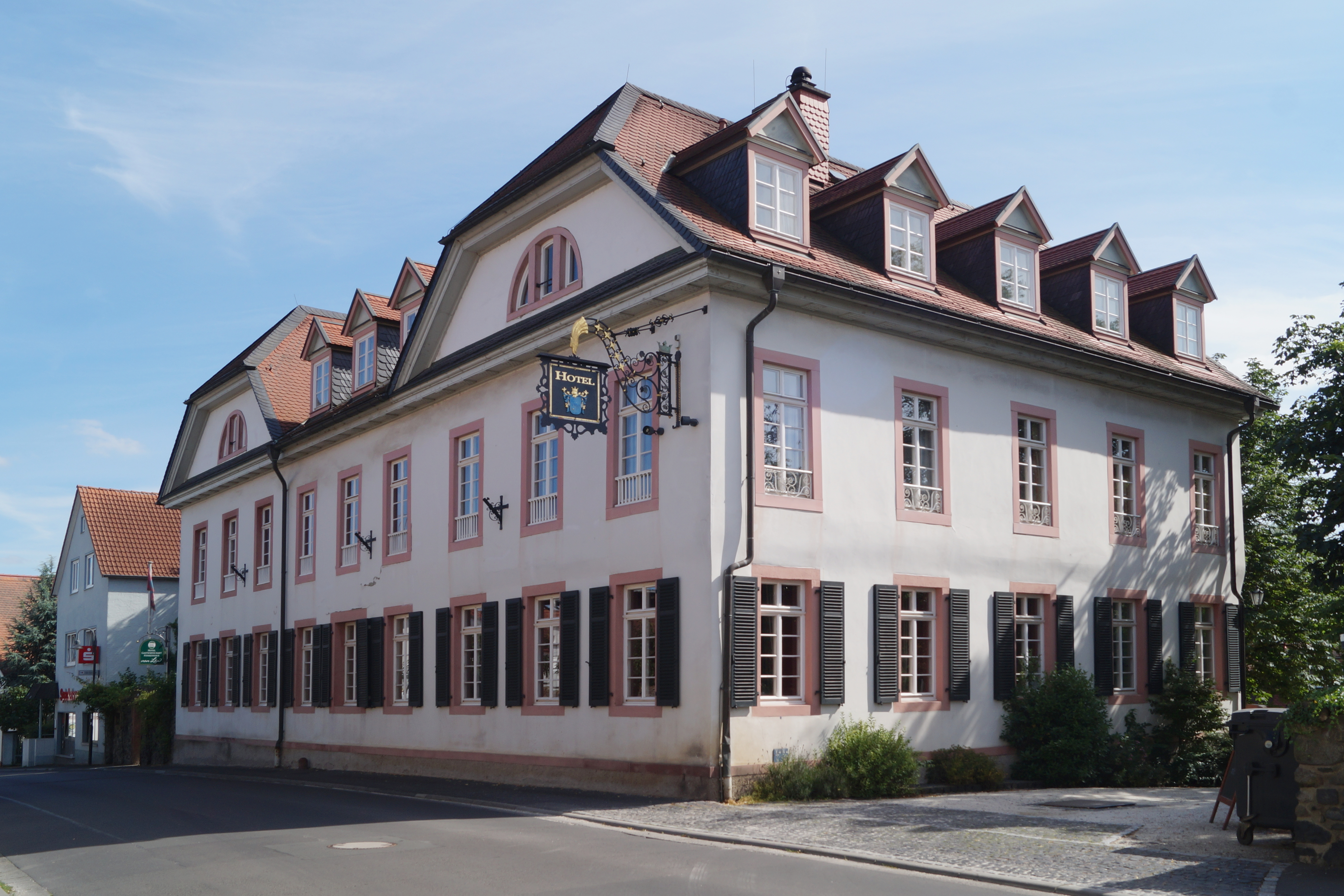 Löwsches Schloss in Steinfurth, Stadt Bad Nauheim in Hessen, Ansicht von Norden.